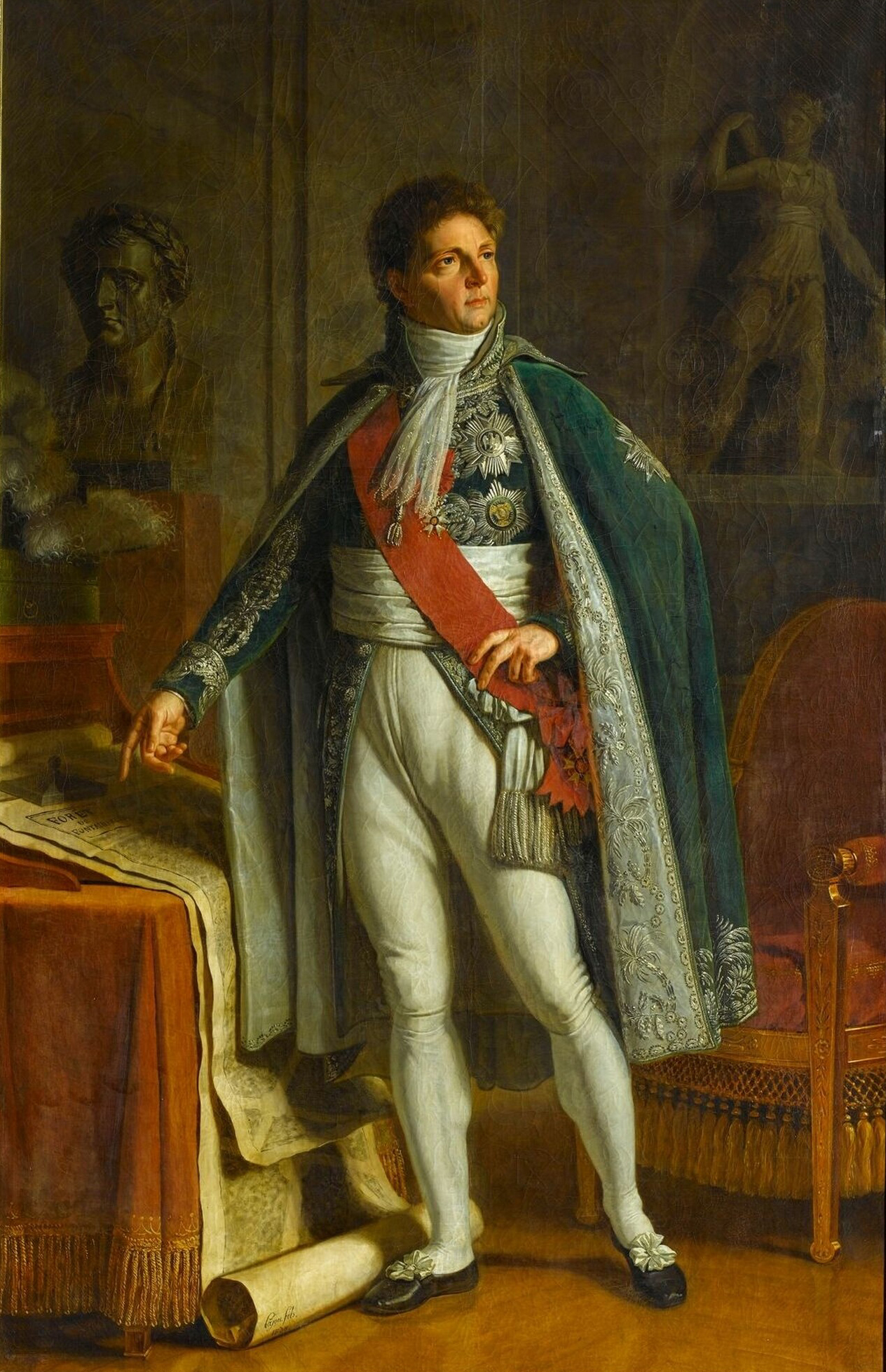 d'après un original exposé au Salon de 1804; commandé par Napoléon Ier pour la salle des maréchaux du palais des Tuileries à Paris en 1804